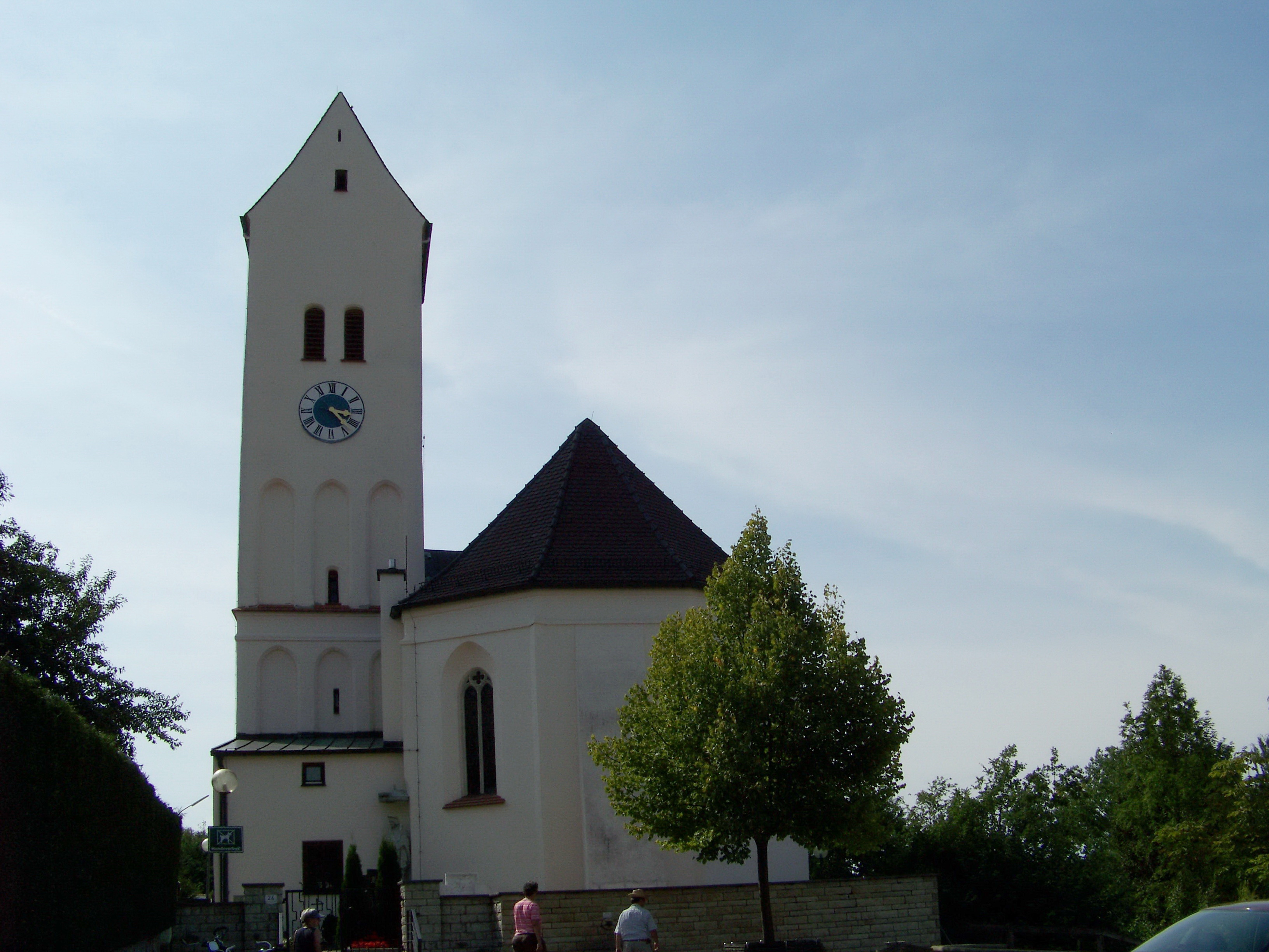 Mainburg, Sandelzhausen. Pfarrkirche Mariä Himmelfahrt. Romanisch, Chor und südliche Seitenkapelle spätgotisch, Turmobergeschoß 1759; mit Ausstattung.